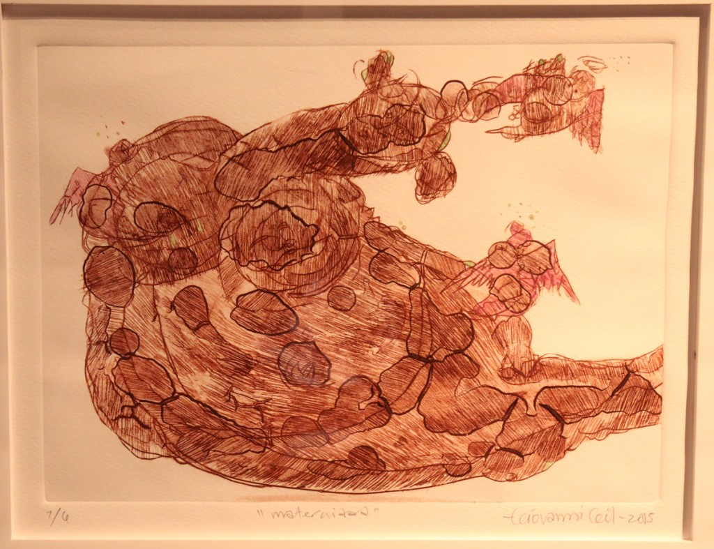 Obra de Giovanni Gil, Grabado